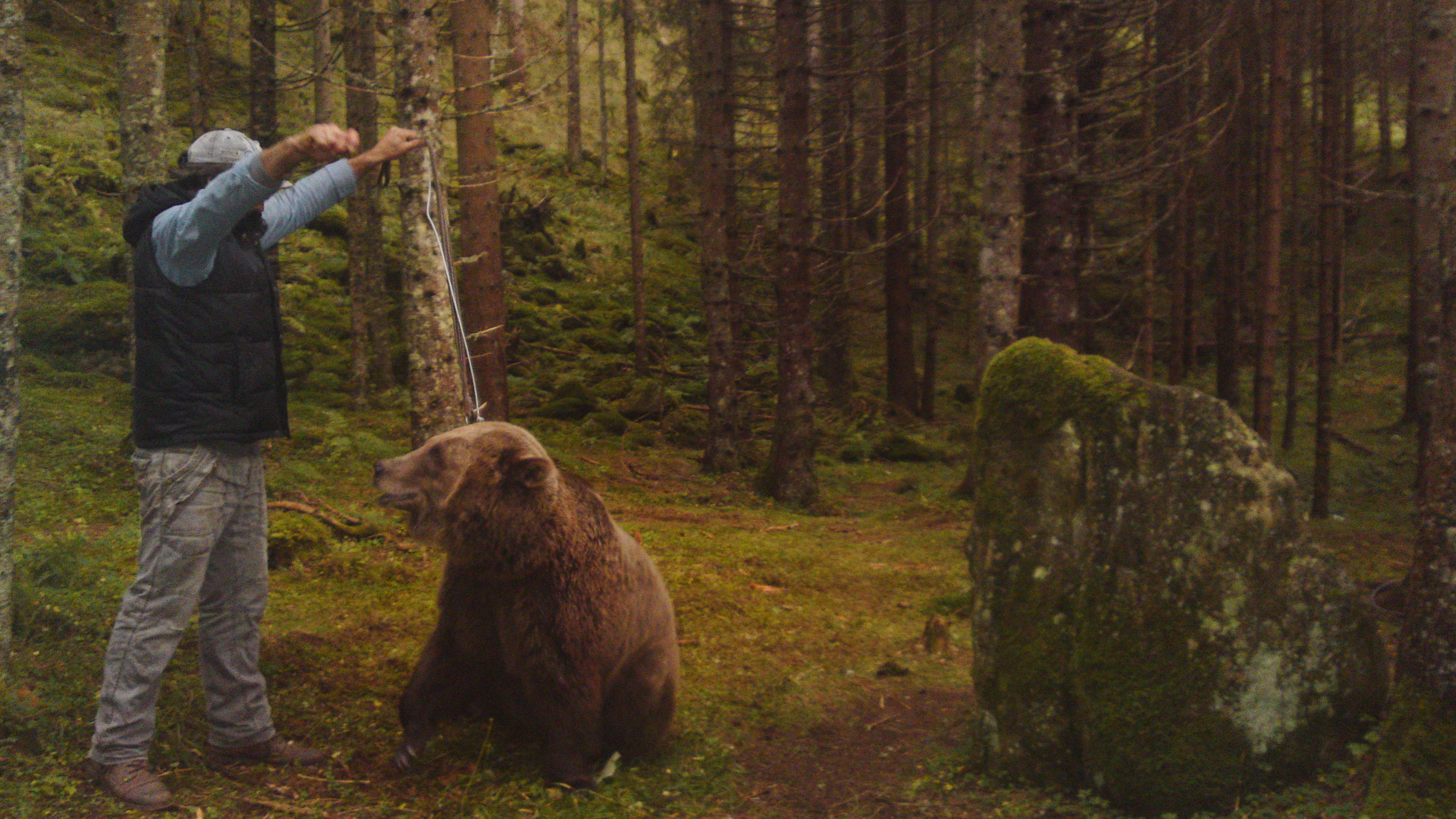 Drehtage mit einem Braunbären zur ZDF-Serie "Die Bergwacht" beim Gasthaus Riesachfall.